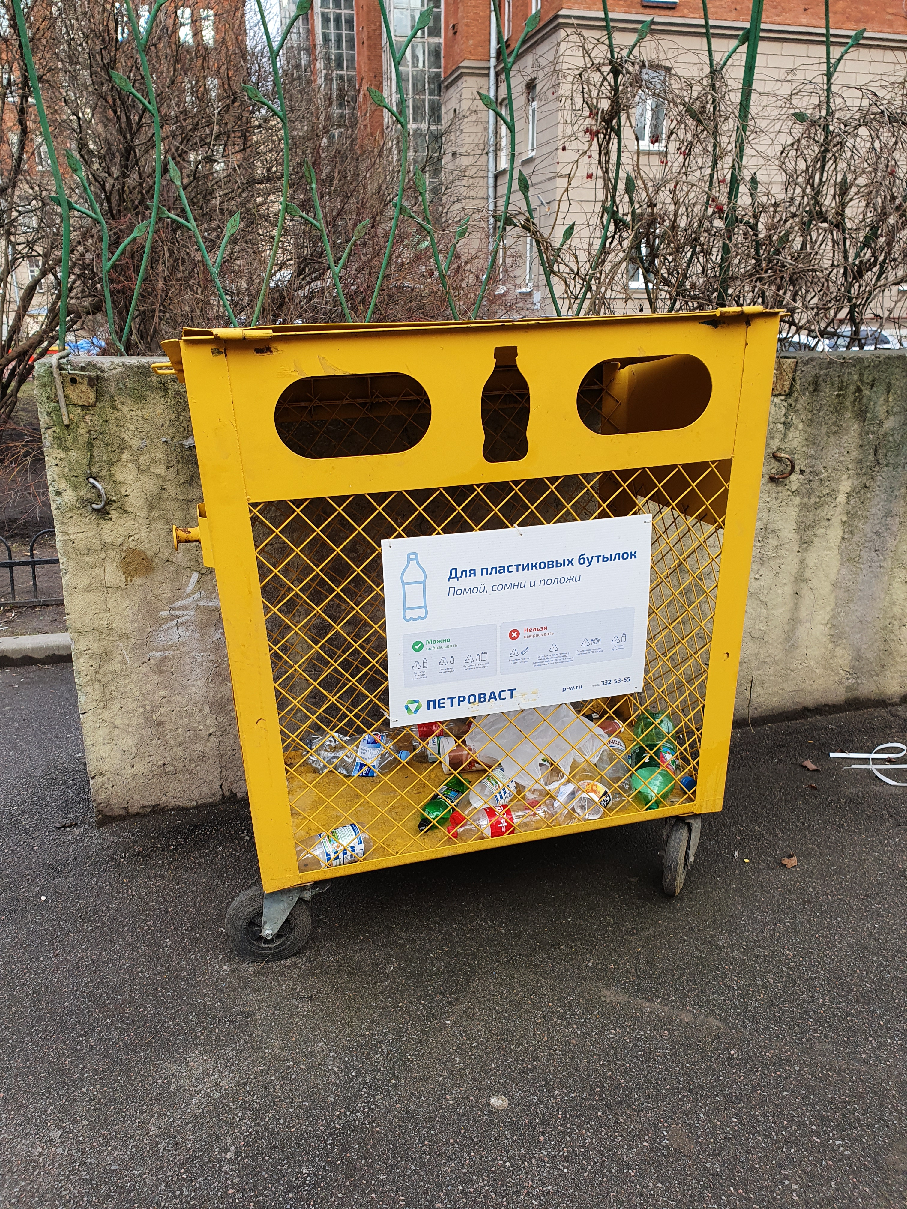 Контейнер для сбора пластиковых отходов